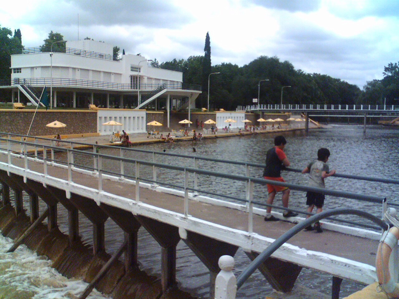 Imagen del Balneario de Salto un día a la mañana